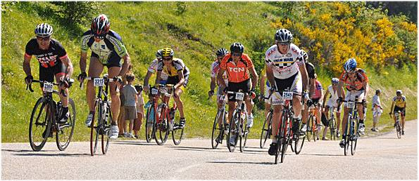 Epreuve cyclosportive "L'Ariégeoise"